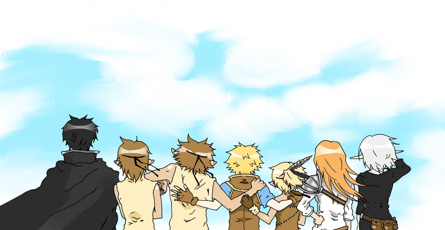 La compagnia principale di "Sitael" disegnata da Alessia Fiorentino